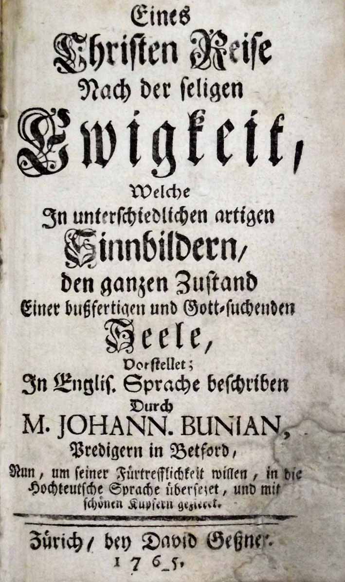 Titel von: Bunyan: Eines Christen Reise nach der seligen Ewigkeit, Zürich, Geßner 1765.